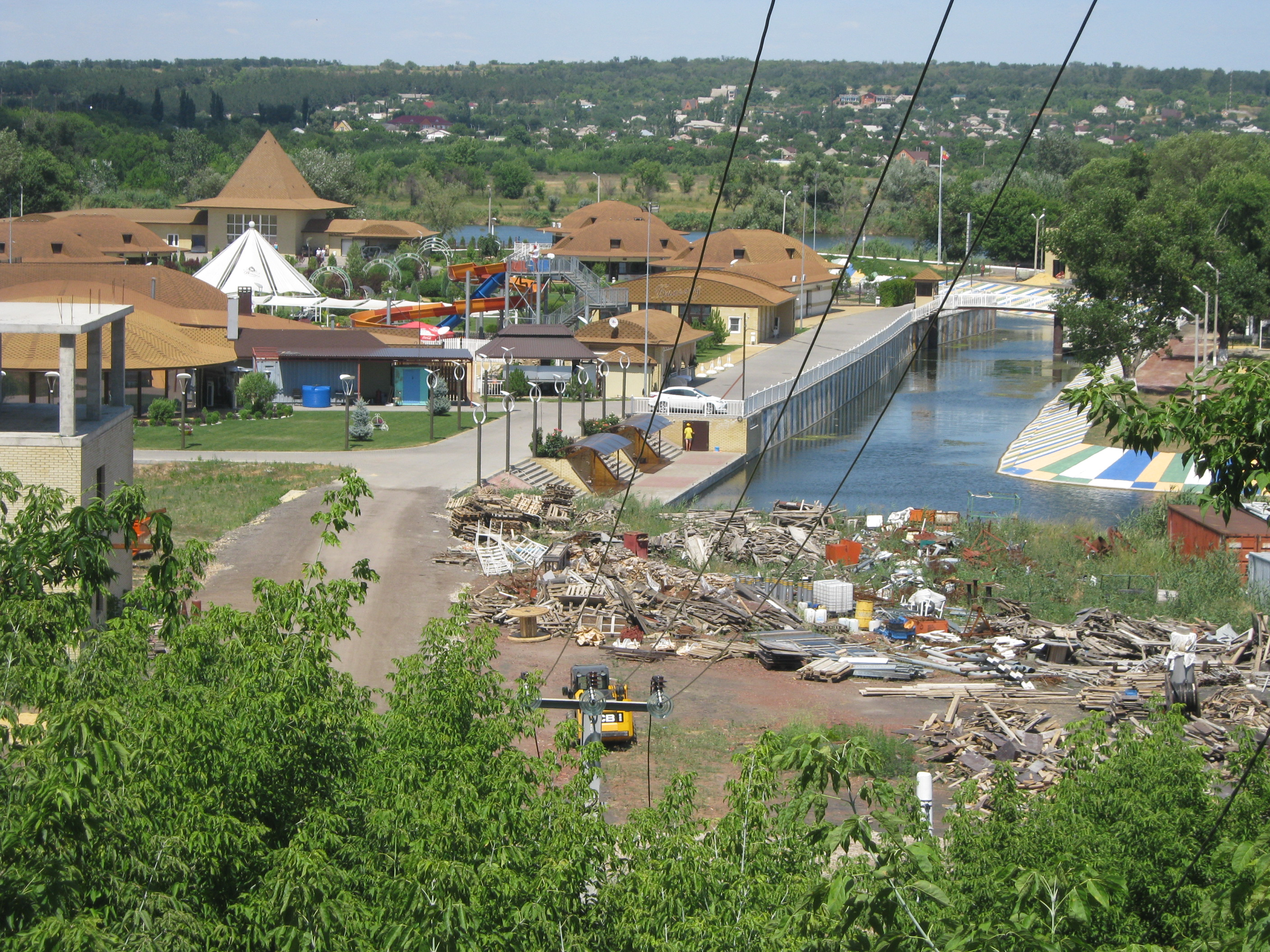 База отдыха Венеция (Каменск-Шахтинский)